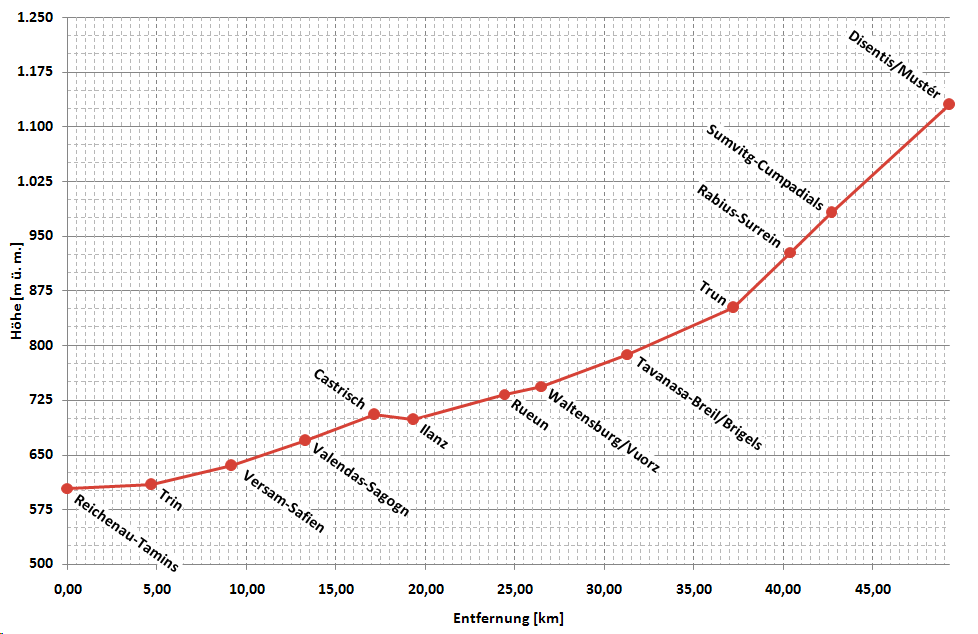 vereinfachtes Höhenprofil der Bahnstrecke Reichenau-Disentis